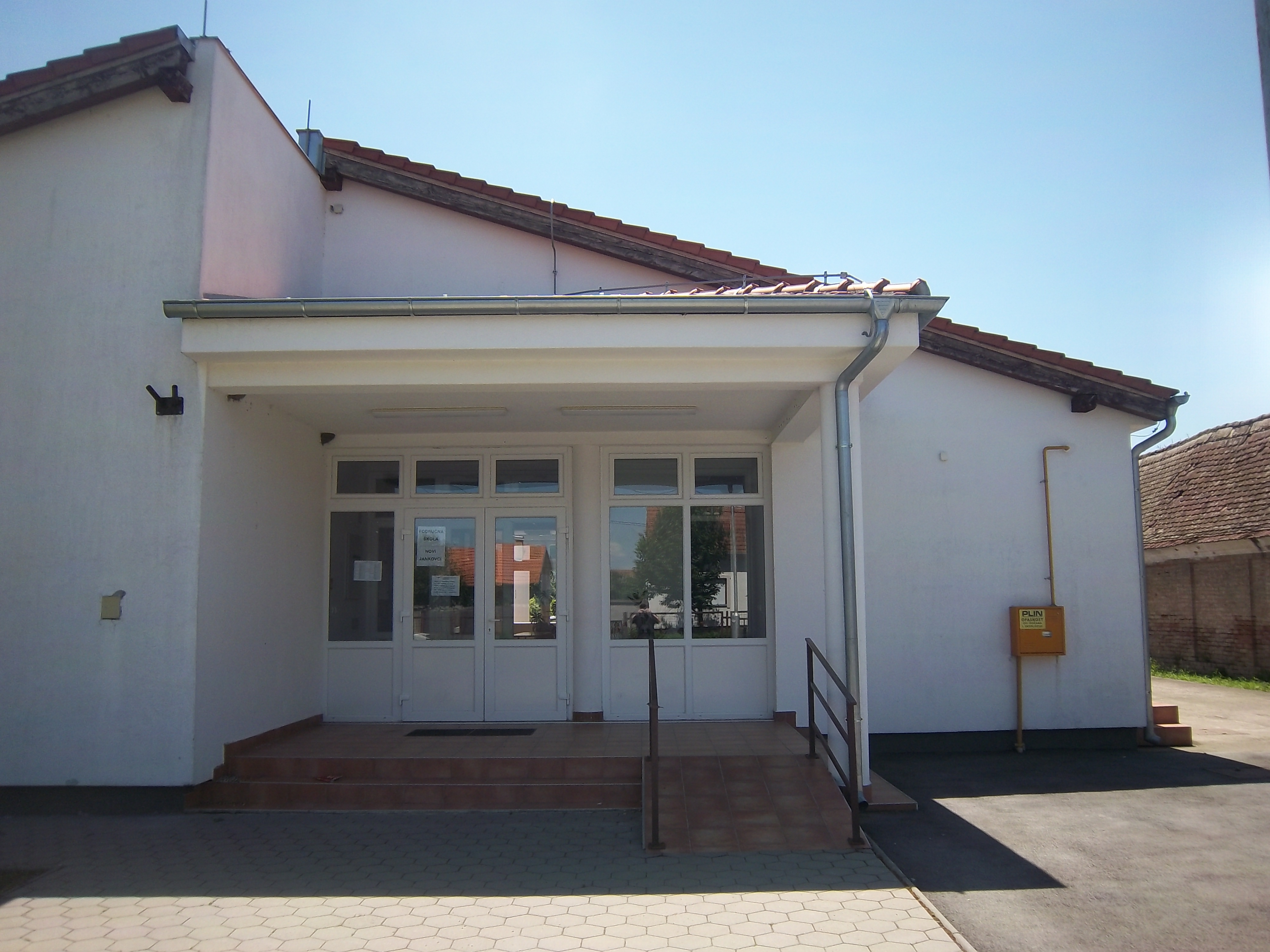 Srpskohrvatski / српскохрватски: Škola u Novim Jankovcima